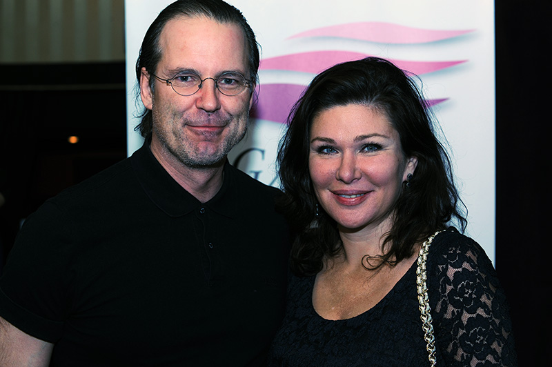 Anders Borg & Dominika Peczynski at GAPF charity auction, Magic Bar, Karlaplan, Stockholm.